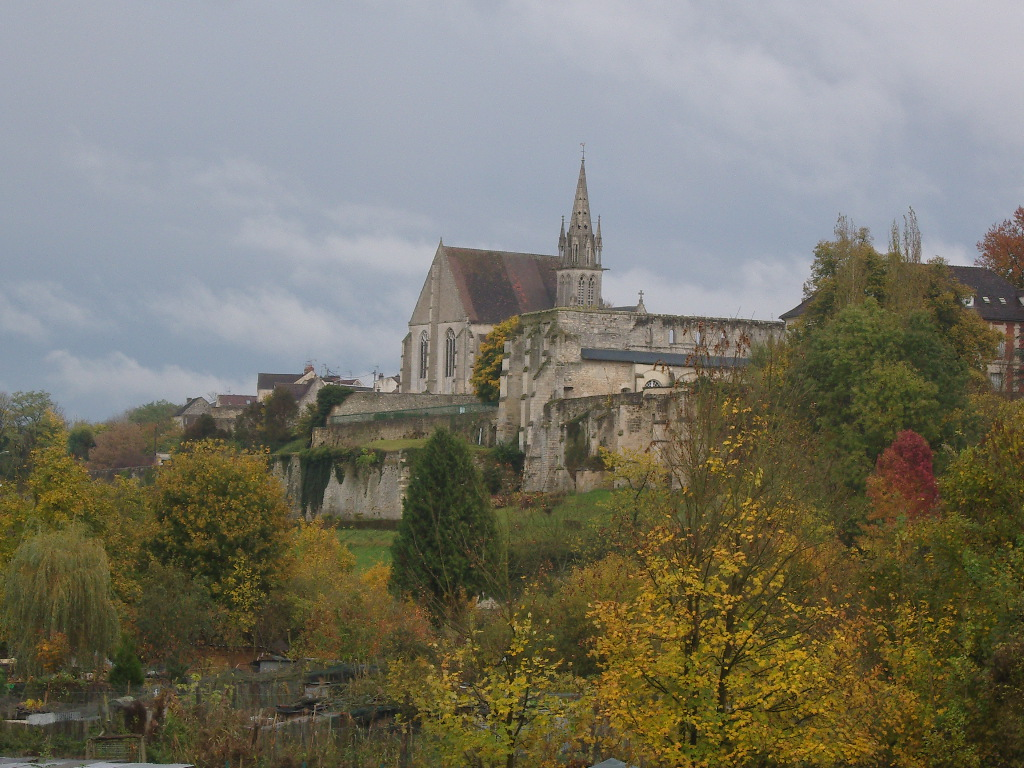 Crépy-en-Valois, église Saint-Denis vue depuis la vallée